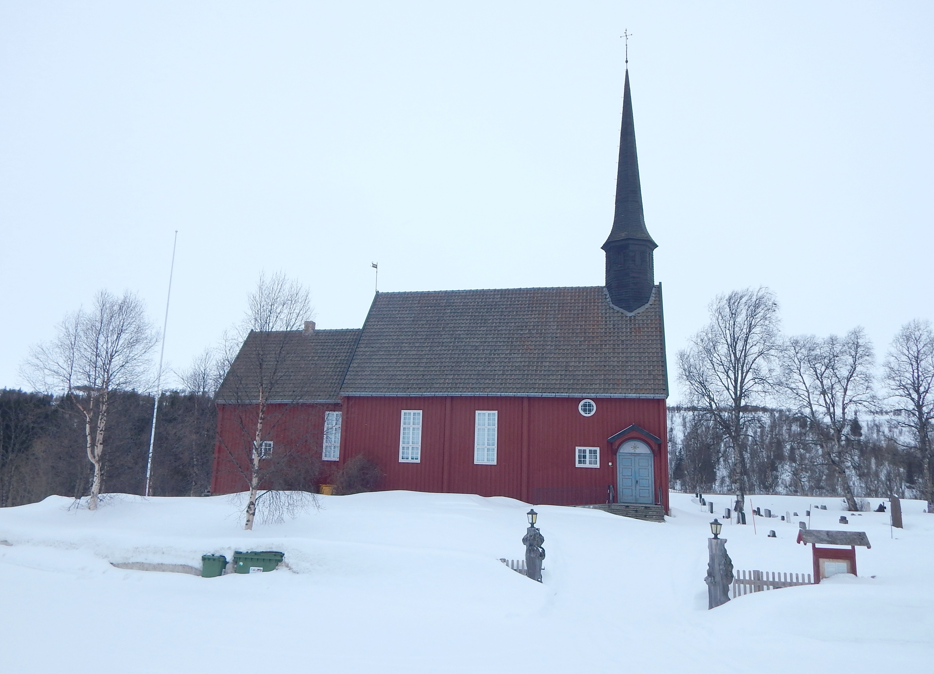 Hessdalen kirke, ved Hessdalsvegen (fylkesvei 576)